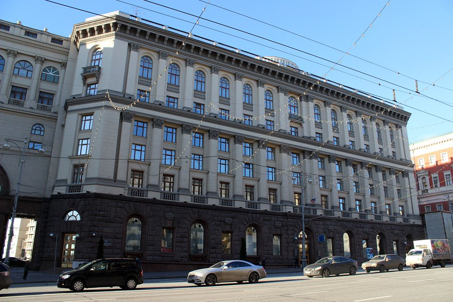 Здание Минобрнауки России